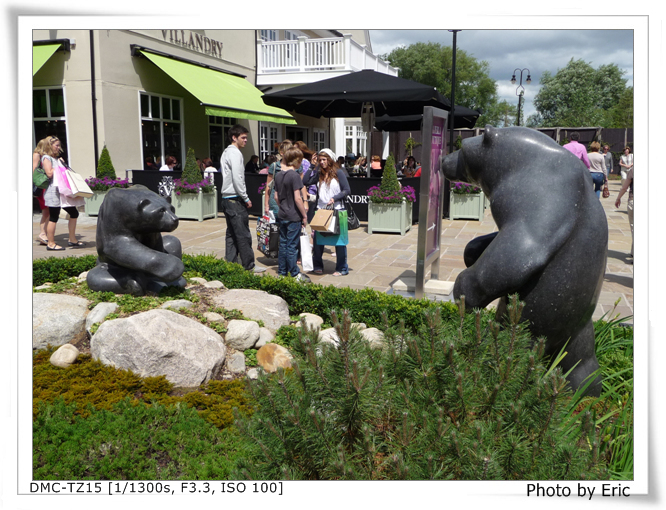 Bicester Village